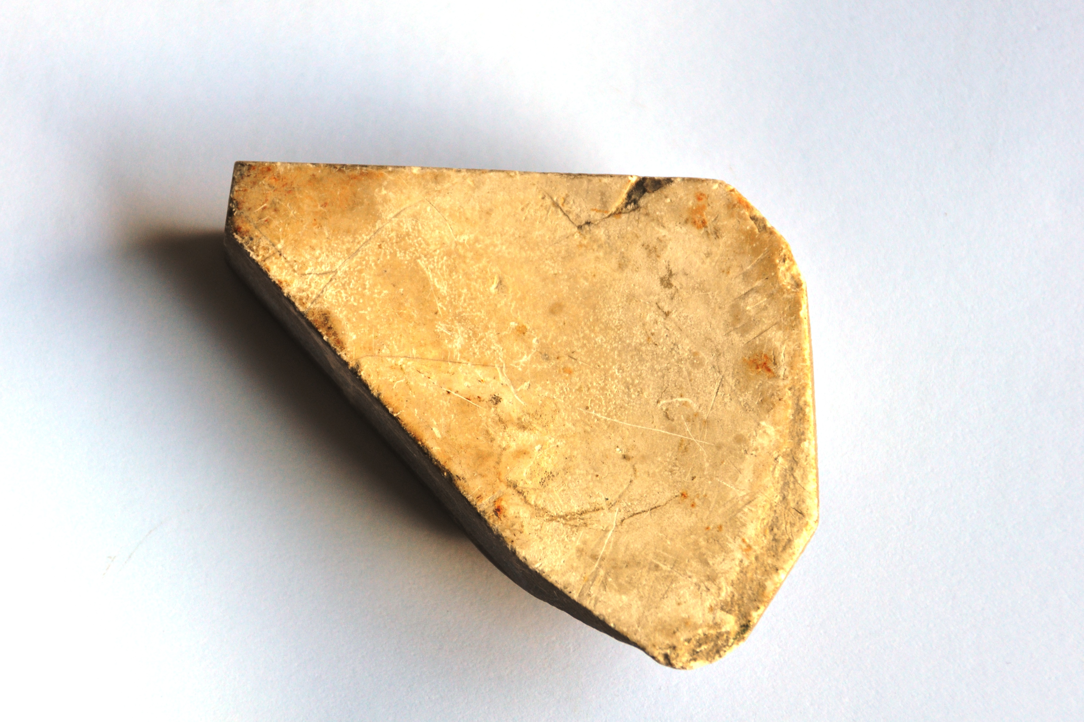 Template:NlWetsteentje.